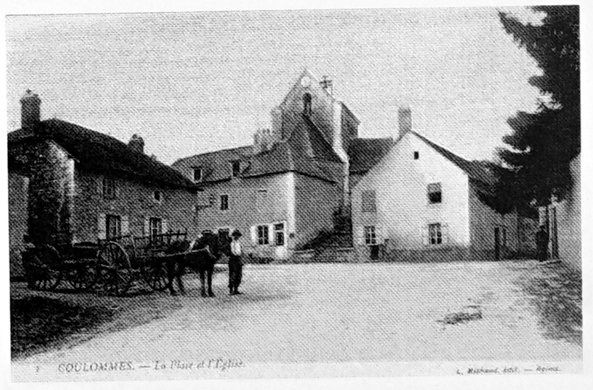 sur une carte postale du début du XXe siècle.